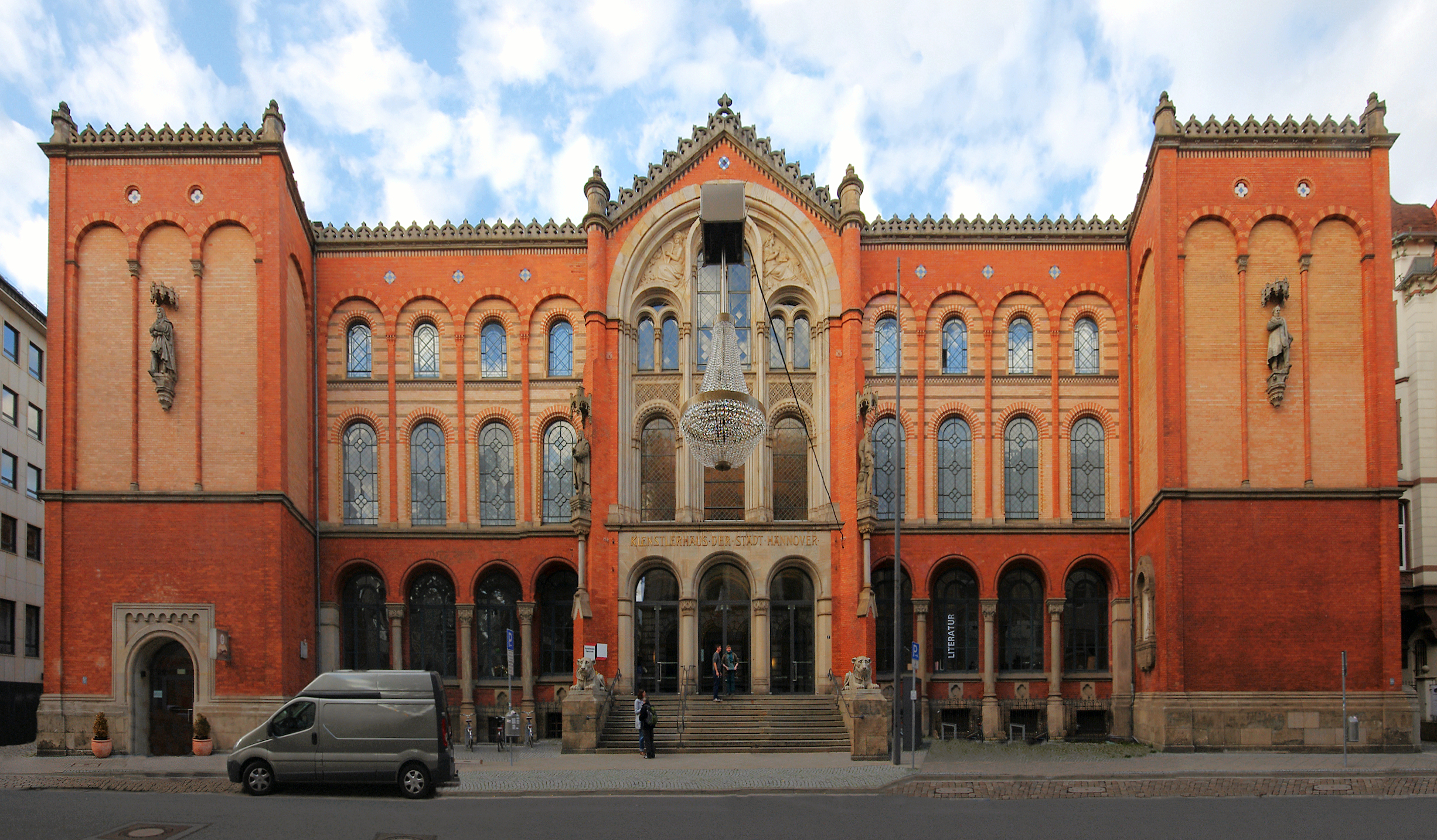 Das Künsterhaus in Hannover in der Sophienstraße. Das Haus wurde 1856 von Conrad Wilhelm Hase erbaut. Das Bild wurde von User:AxelHH aus verschiedenen Bilder gesticht.